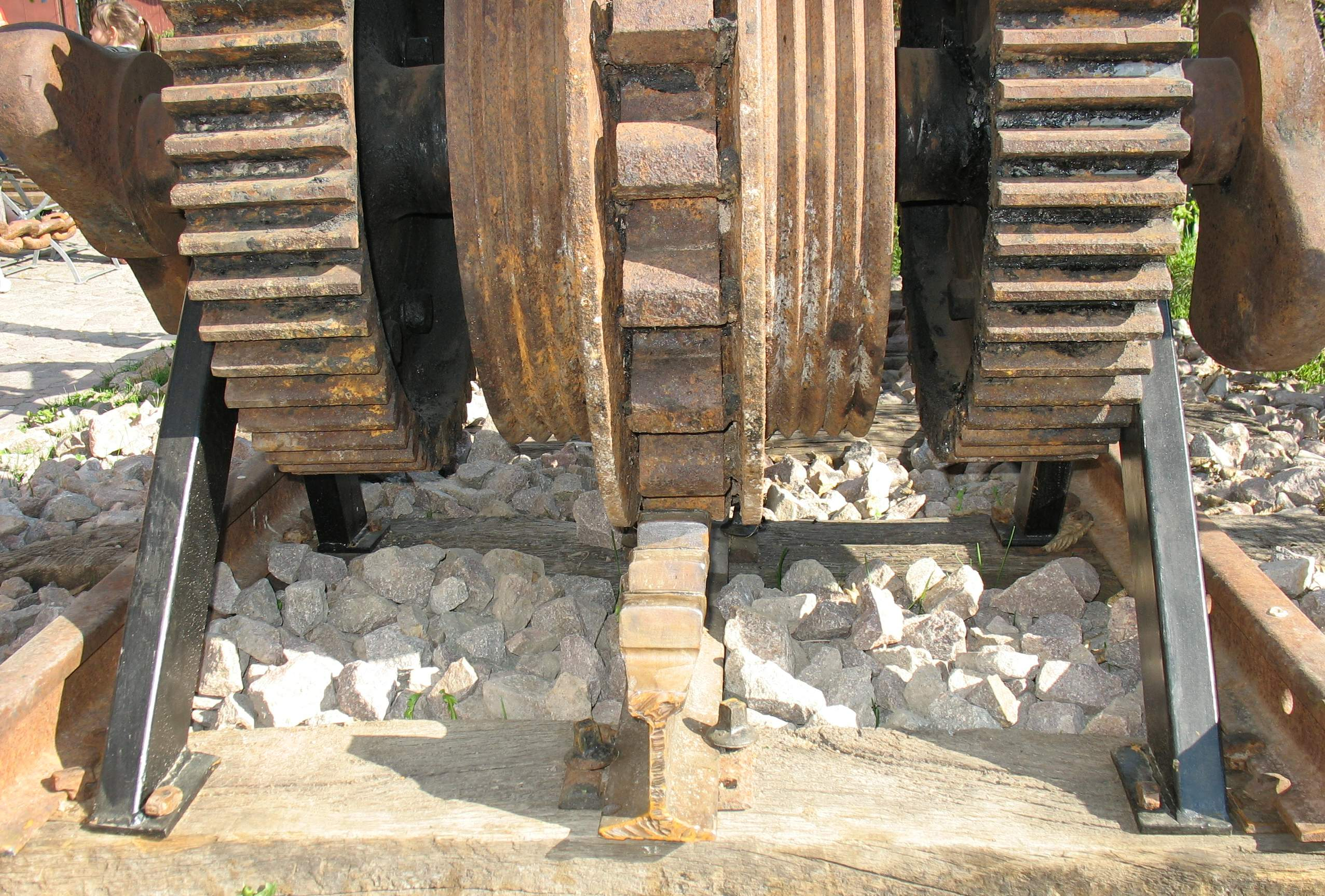 Zahnrad-Antriebsachse der Rittner-Zahnradbahn, System Strub. Klobenstein, April 2007